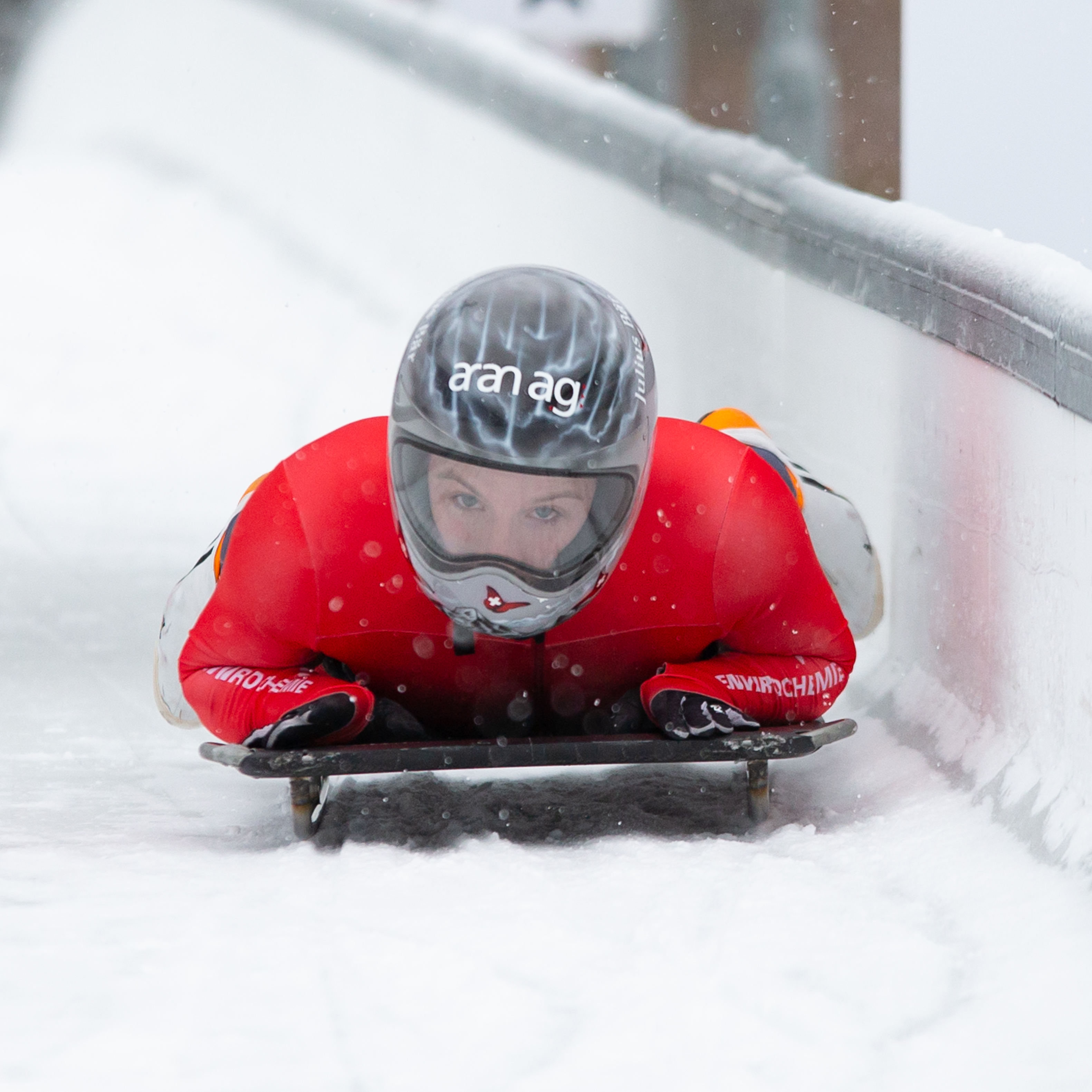 BMW IBSF World Cup Bobsleigh and Skeleton Altenberg; Marina Gilardoni (SUI, Schweiz) im Ziel